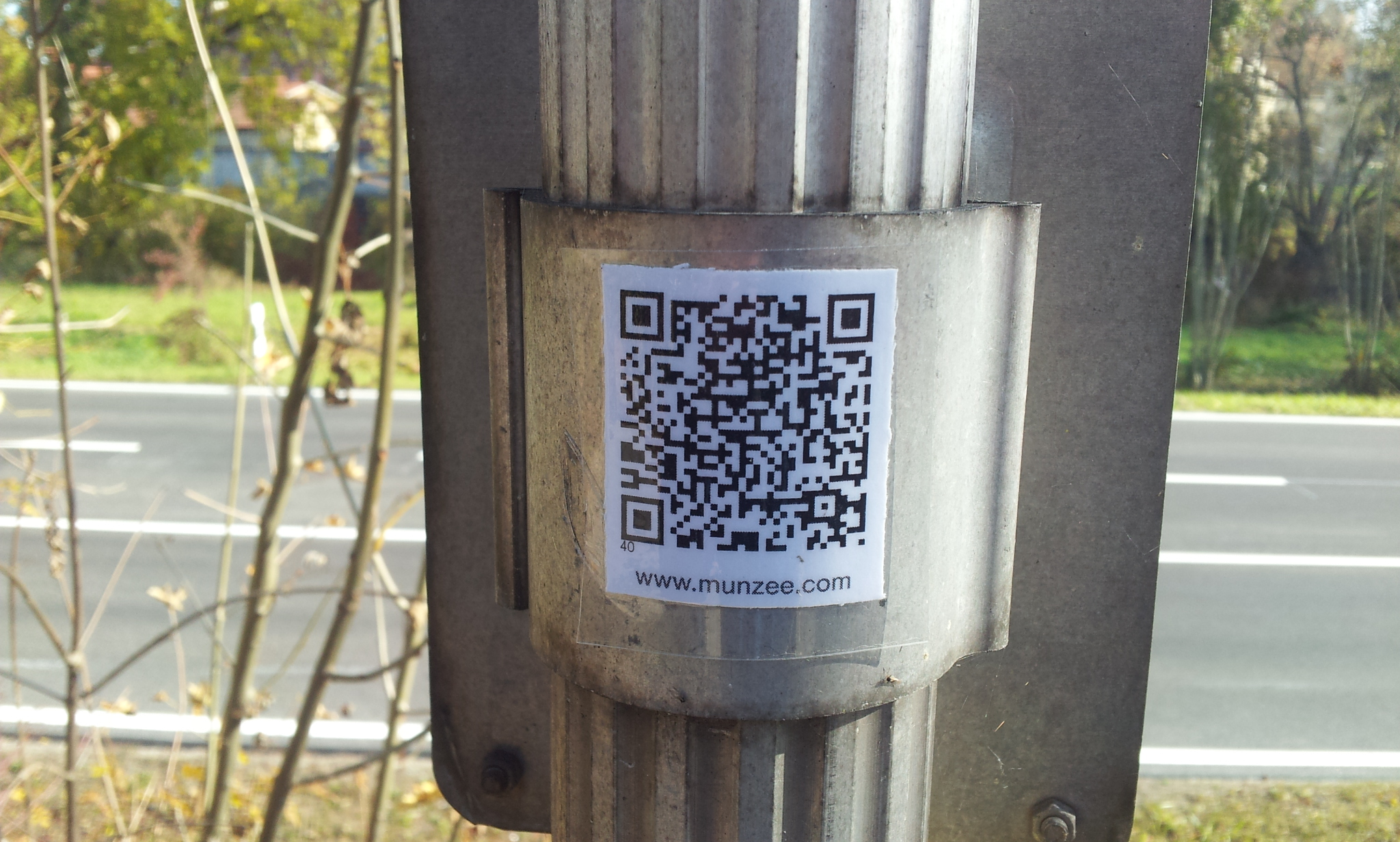 Munzee auf der Rückseite eines Schildes